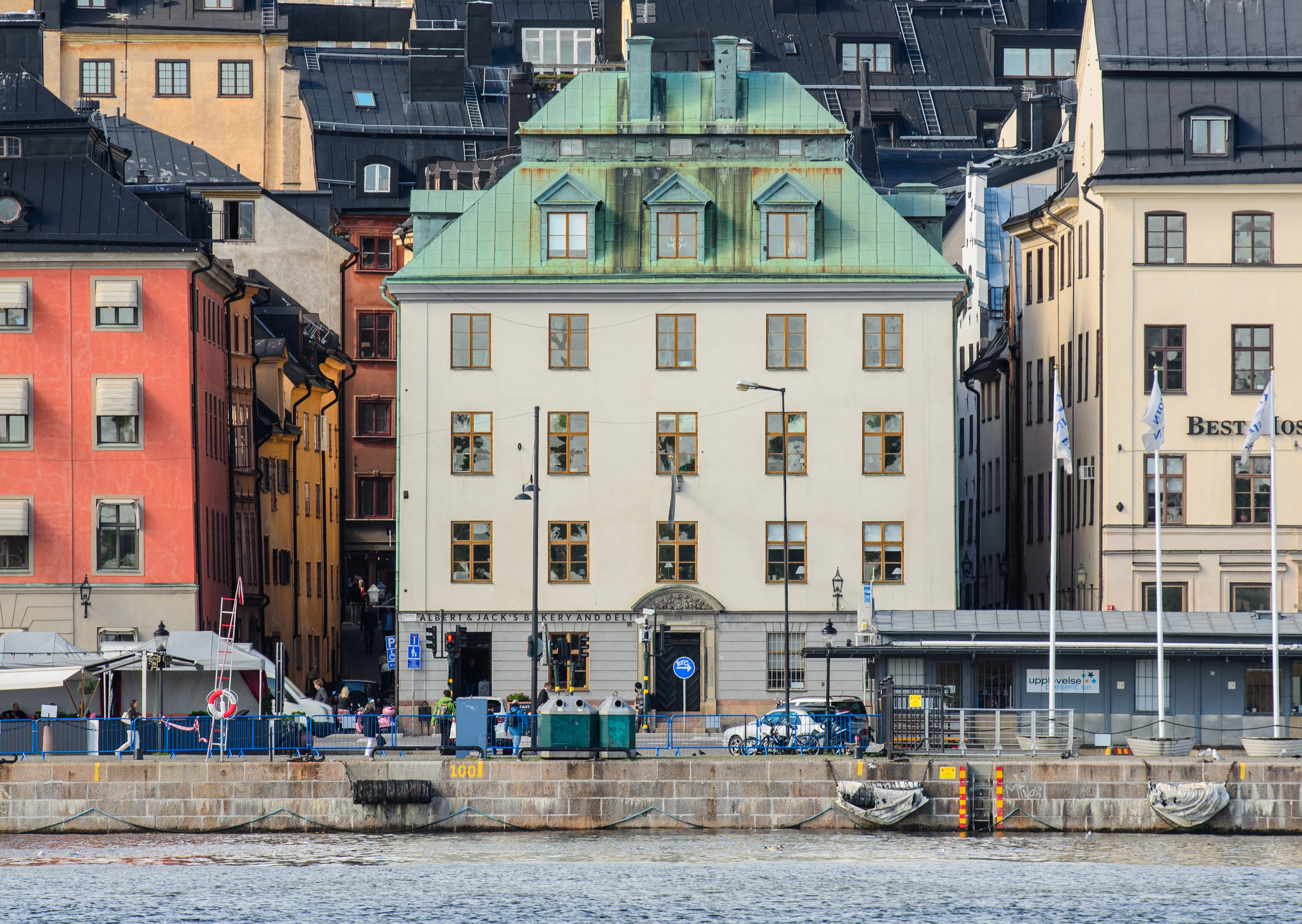 Skeppsbron 24 seen from Skeppsholmen, , Gamla stan (Old town), Stockholm. Built 1630.